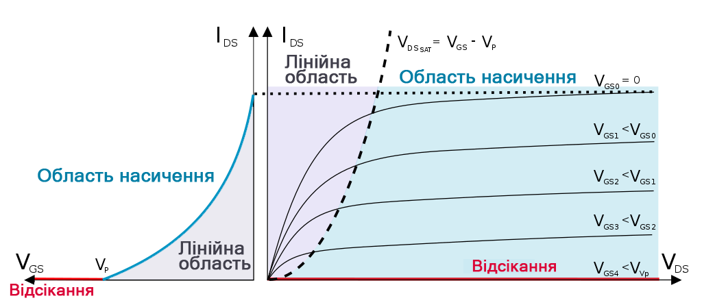 Вольт-амперні характеристики польового транзистора, стікзатворна характеристика